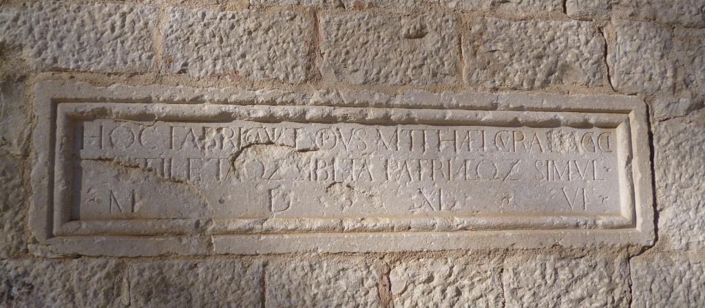 ploča koja se nalazila iznad ulaza u kaštel